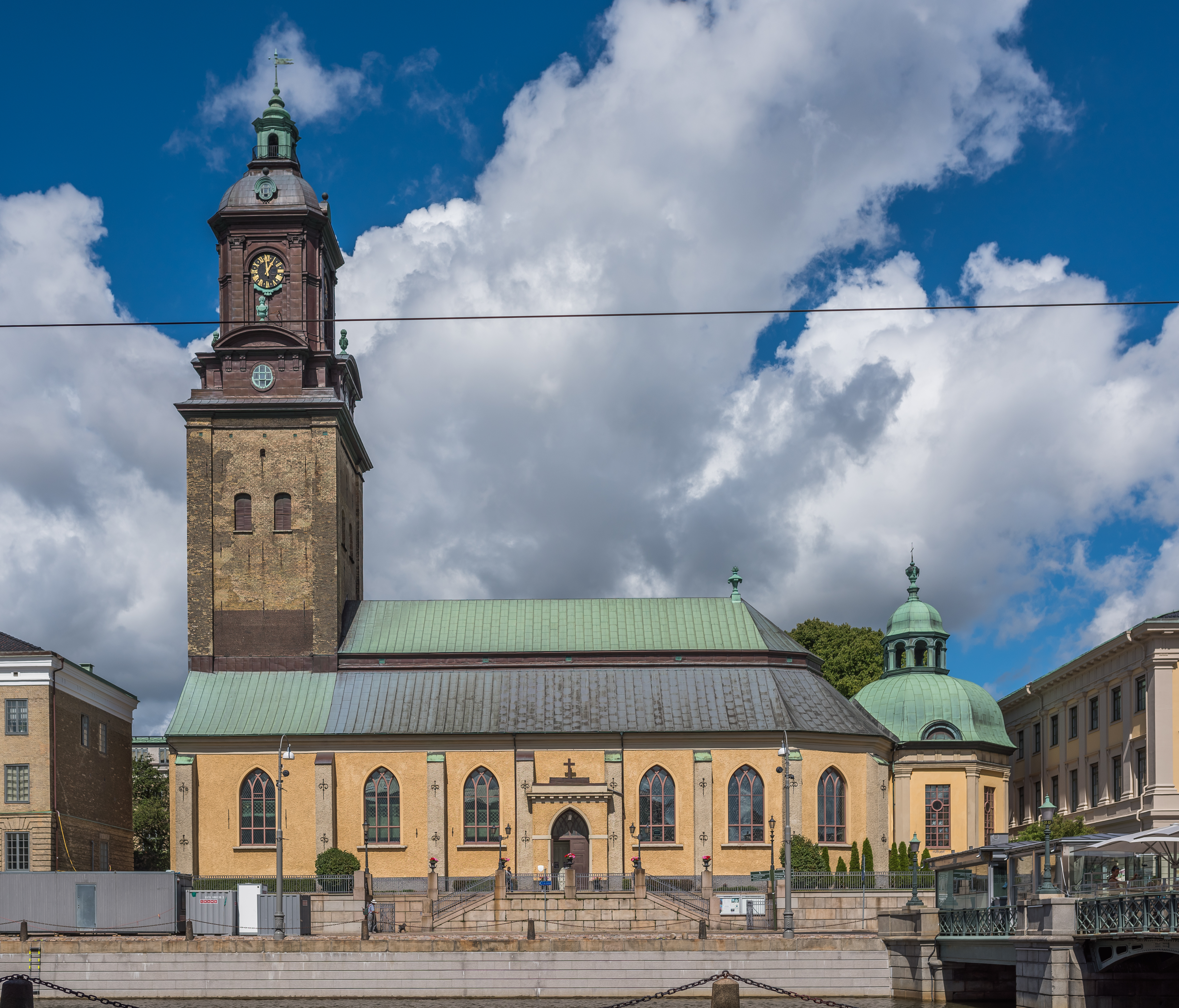 Göteborg Sweden July 2016